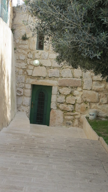 The Grave of the Prophetess Hulda - Pelagia, Mount of Olives, Jerusalem, Israel The Burial Crypt Of Rabiya al-Adawiyya קבר חולדה הנביאה